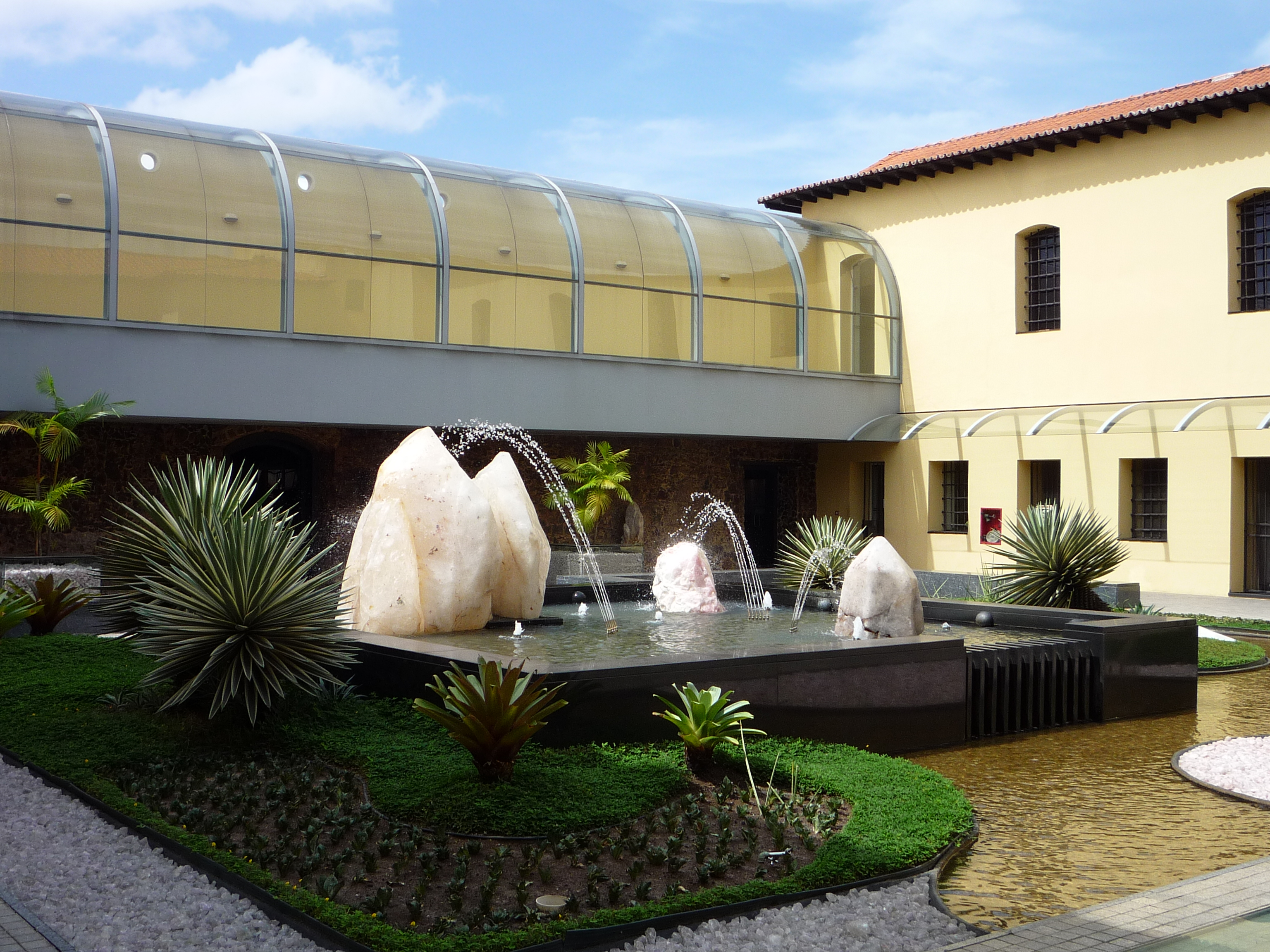 Quartzos gigantes no jardim interno